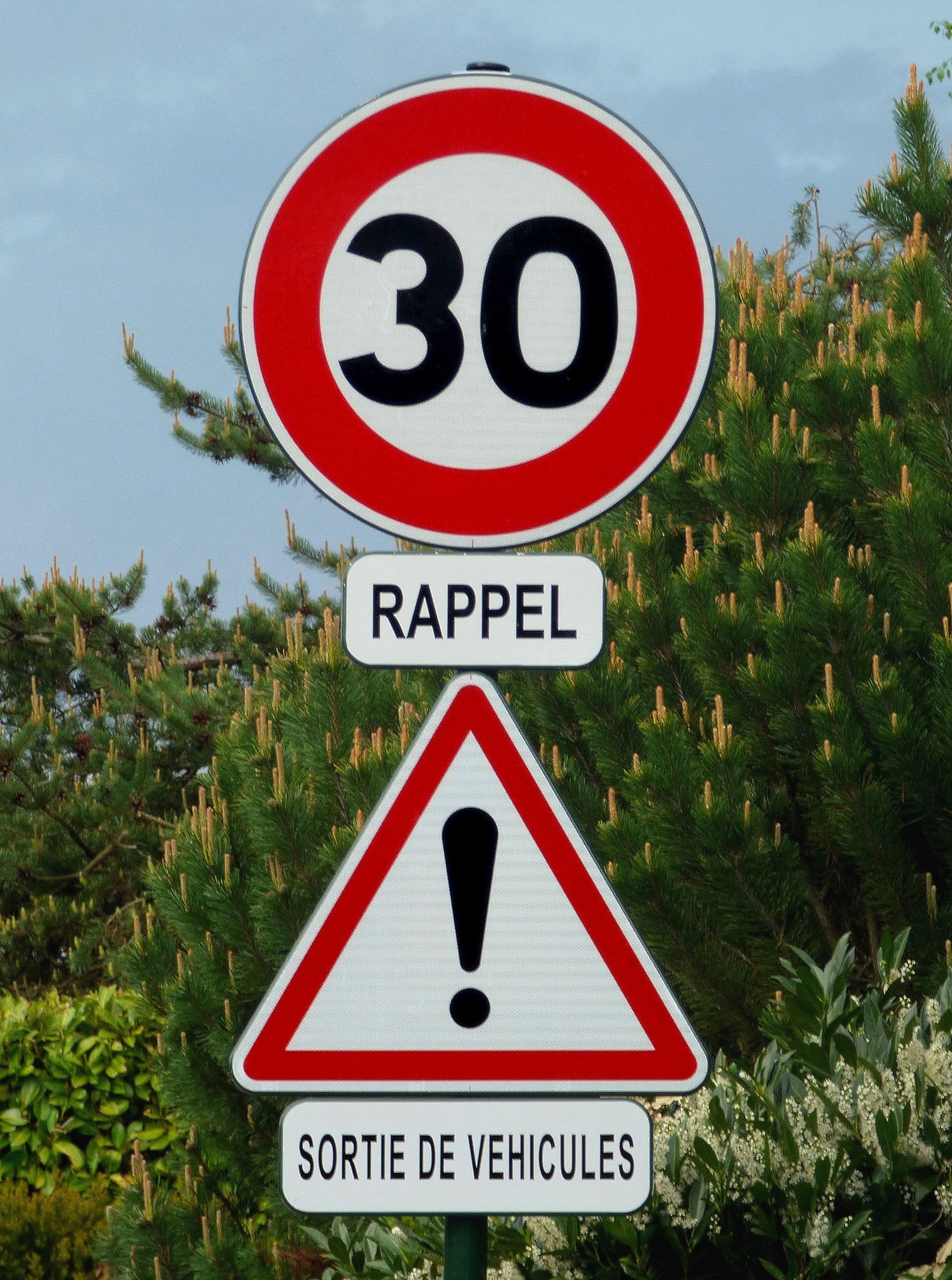 Panneaux de signalisation de type B14, A14 et M9z (panonceaux) sur une route communale en France (Aix-les-Bains).